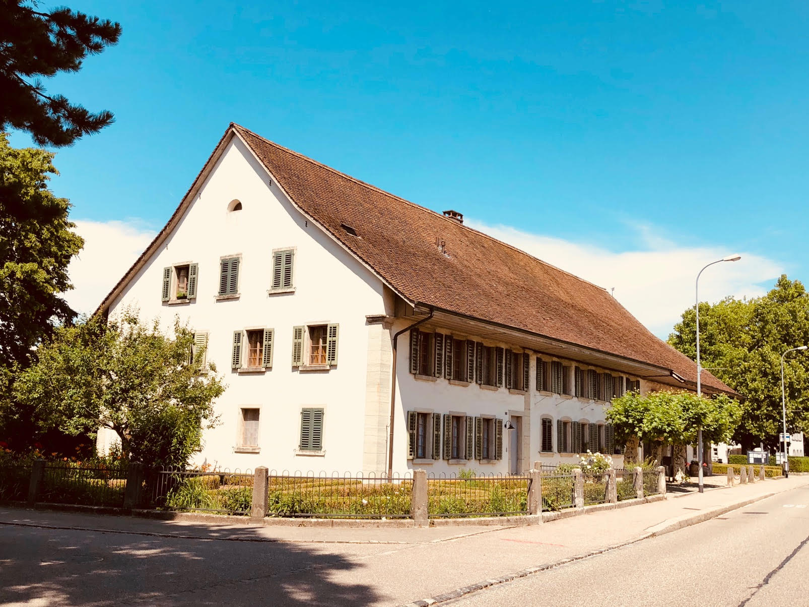 Bosshardhaus (Windisch)